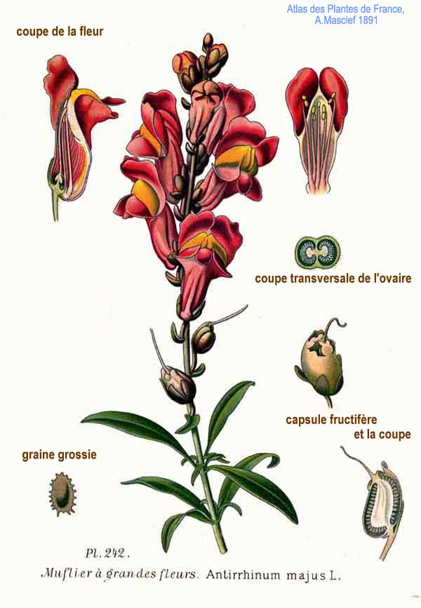 Anthirrhinum majus L